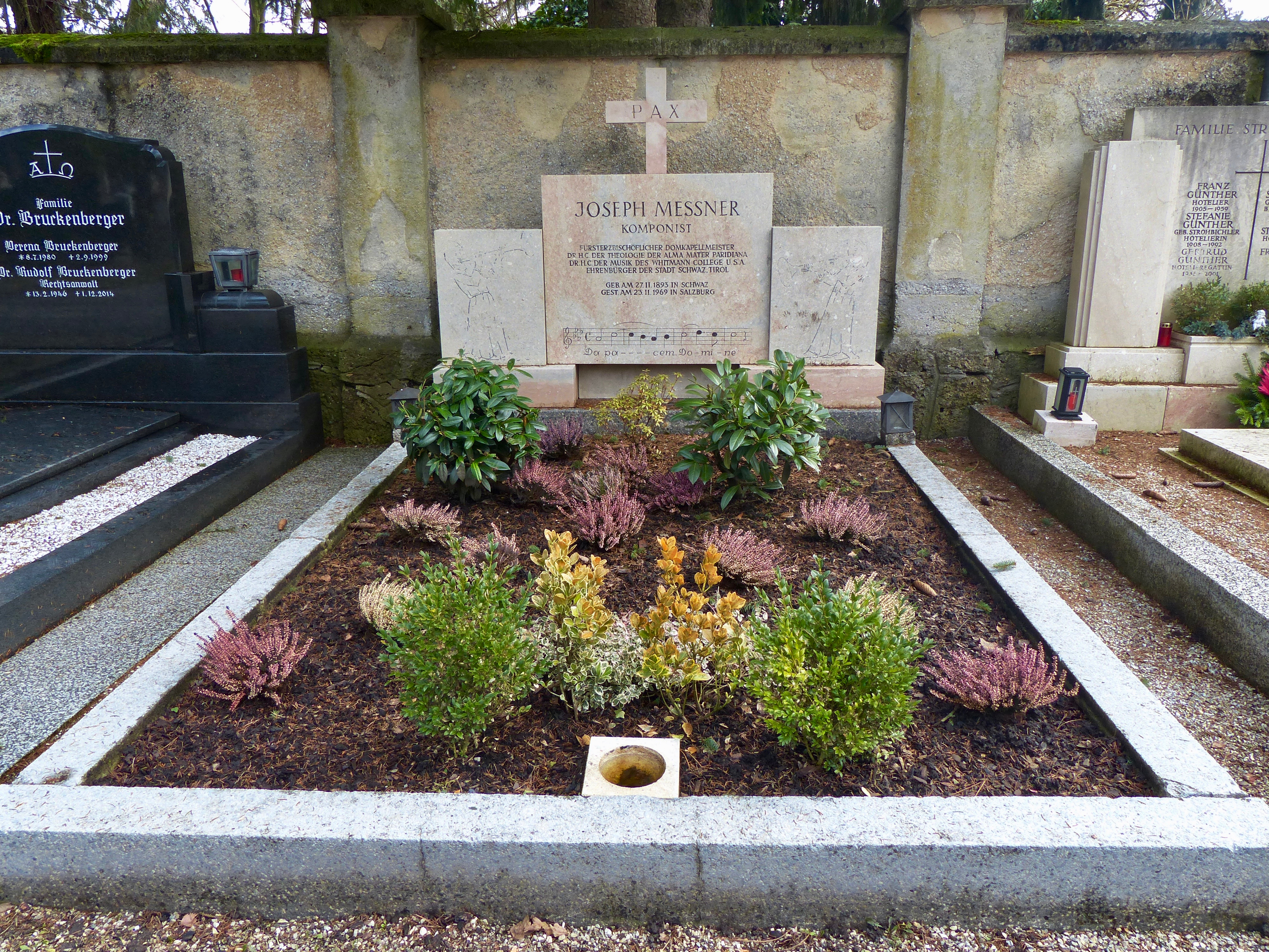 Grabmal von Joseph Messner auf dem Kommunalfriedhof Salzburg